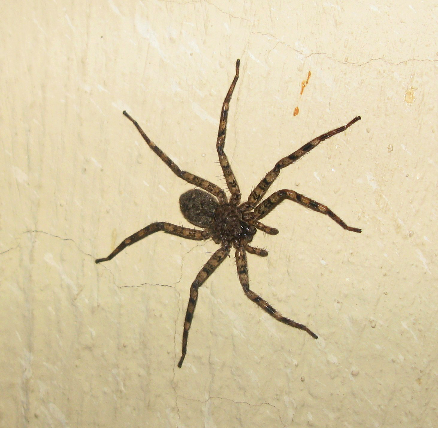 Selenops gracilis Mexico: Chapala Lake